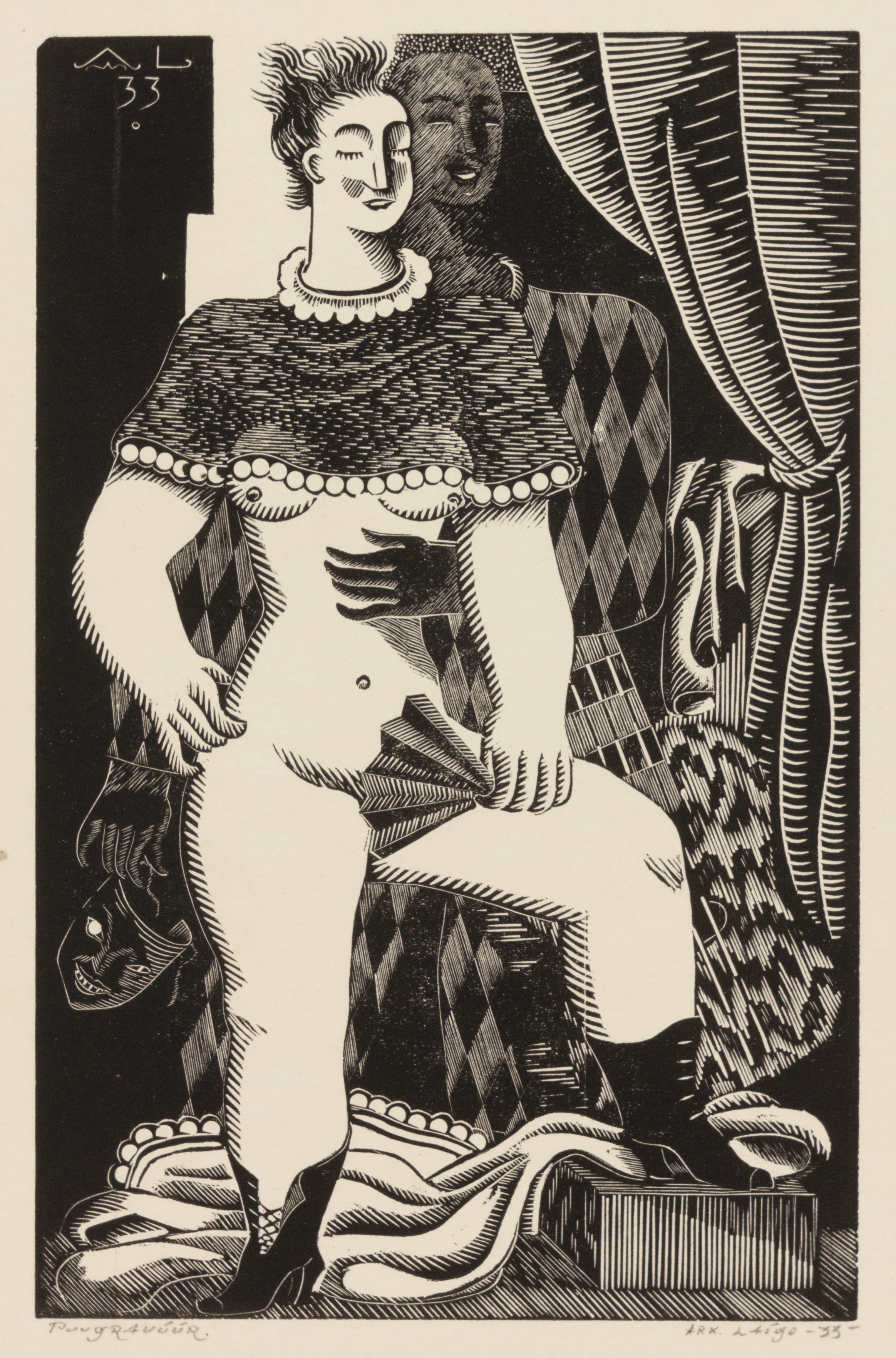 "Maskeraad" (1933), puugravüür. Kujutise kõrgus 20,0 cm ja laius 12,7 cm; lehe kõrgus 26,4 cm ja laius 31,1 cm. MUIS:TKM TR 2132 G 727